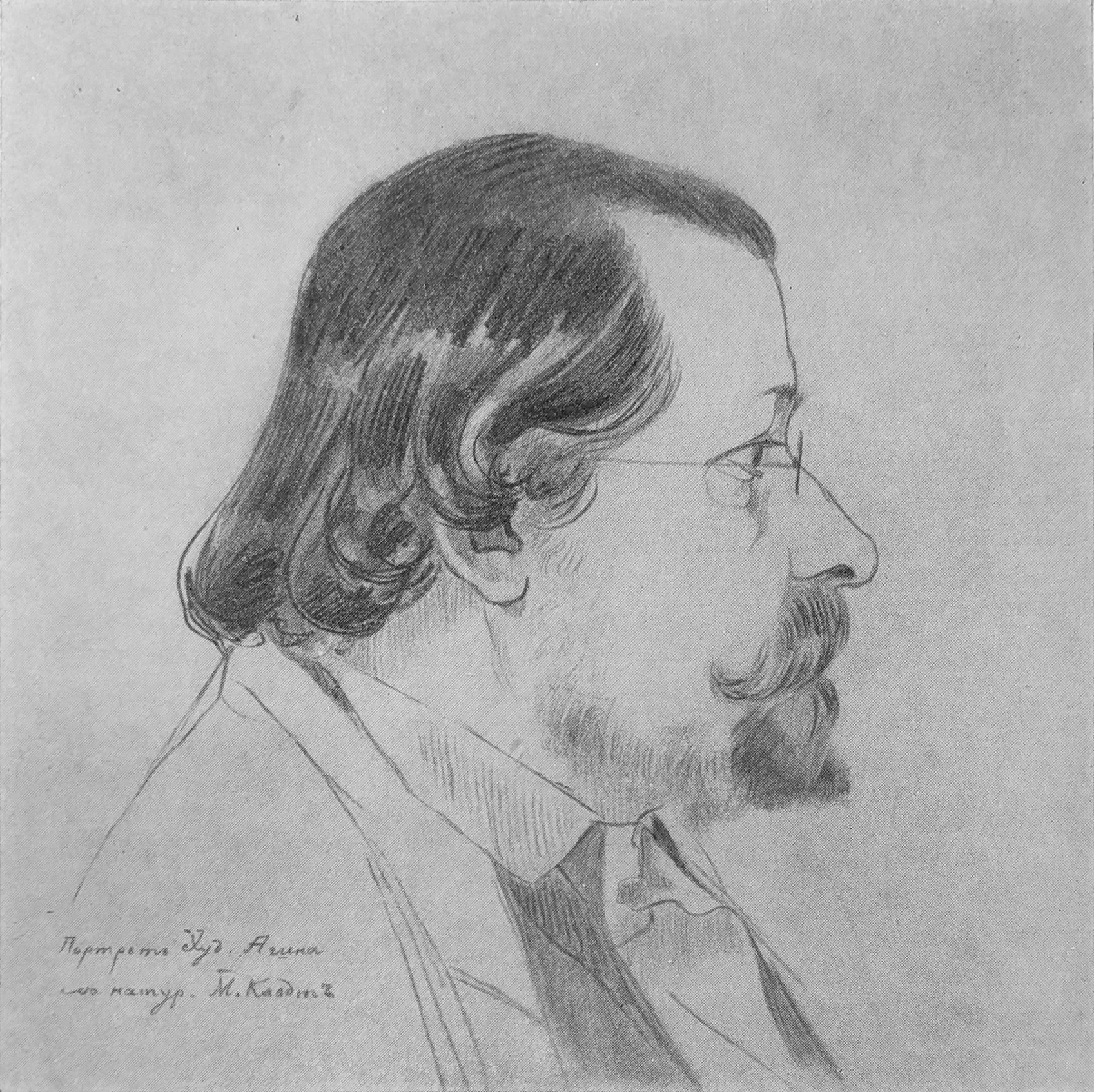 М. П. Клодт. Портрет А. А. Агина